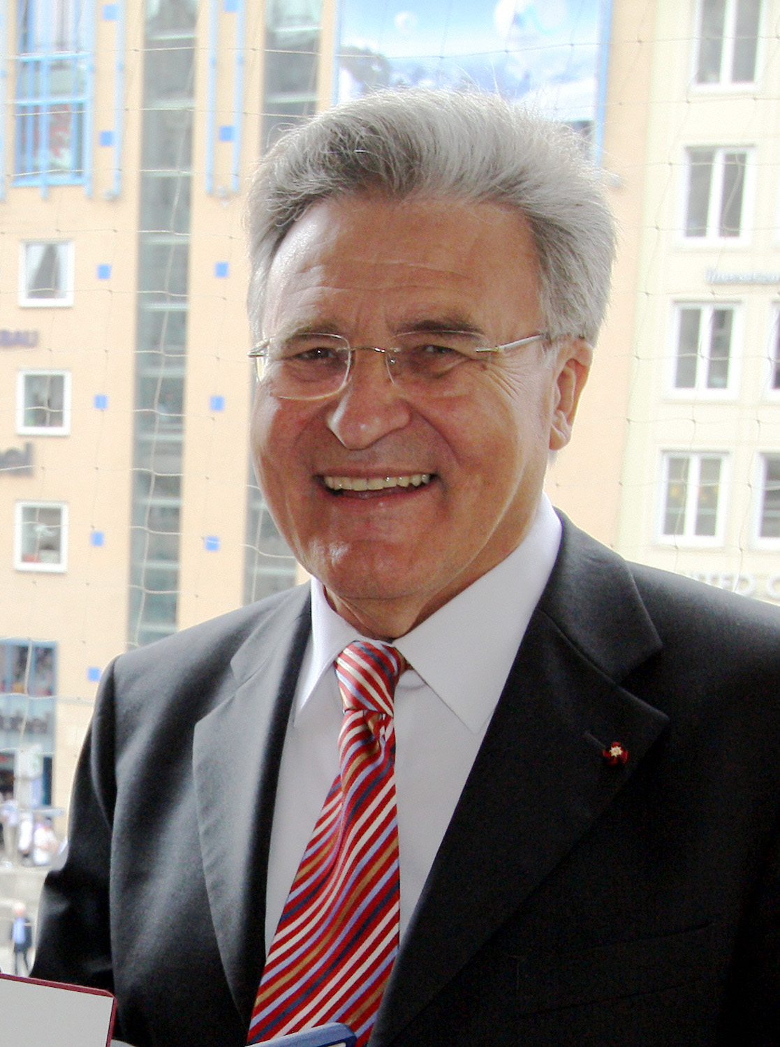 Prof. Dr. Alois Baumgartner, deutscher Theologe Hier unmittelbar nach der Verleihung der Medaille 'München leuchtet – Den Freunden Münchens' im Münchner Rathaus (27.04.2011)